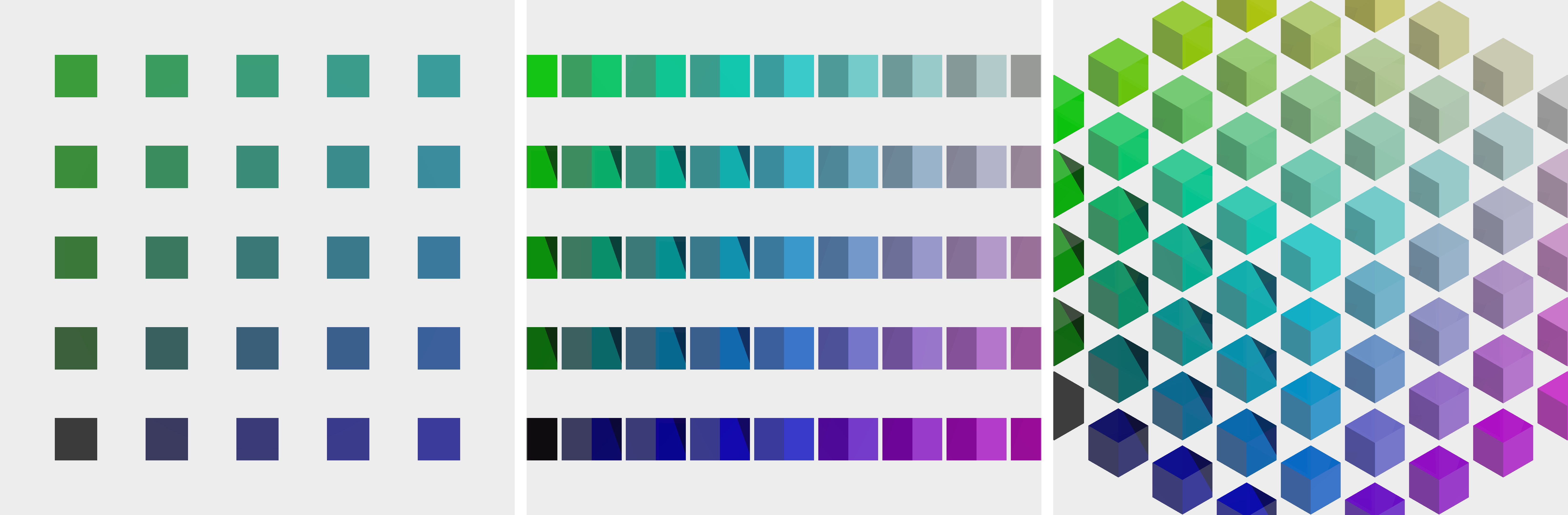 Một ví dụ ảnh phép chiếu trực giao. Có 125 khối lập phương trong cấu trúc lập phương 5×5×5. Ảnh kết xuất bằng phần mền doTia tôi sáng tạo. Phạm vi công cộng.